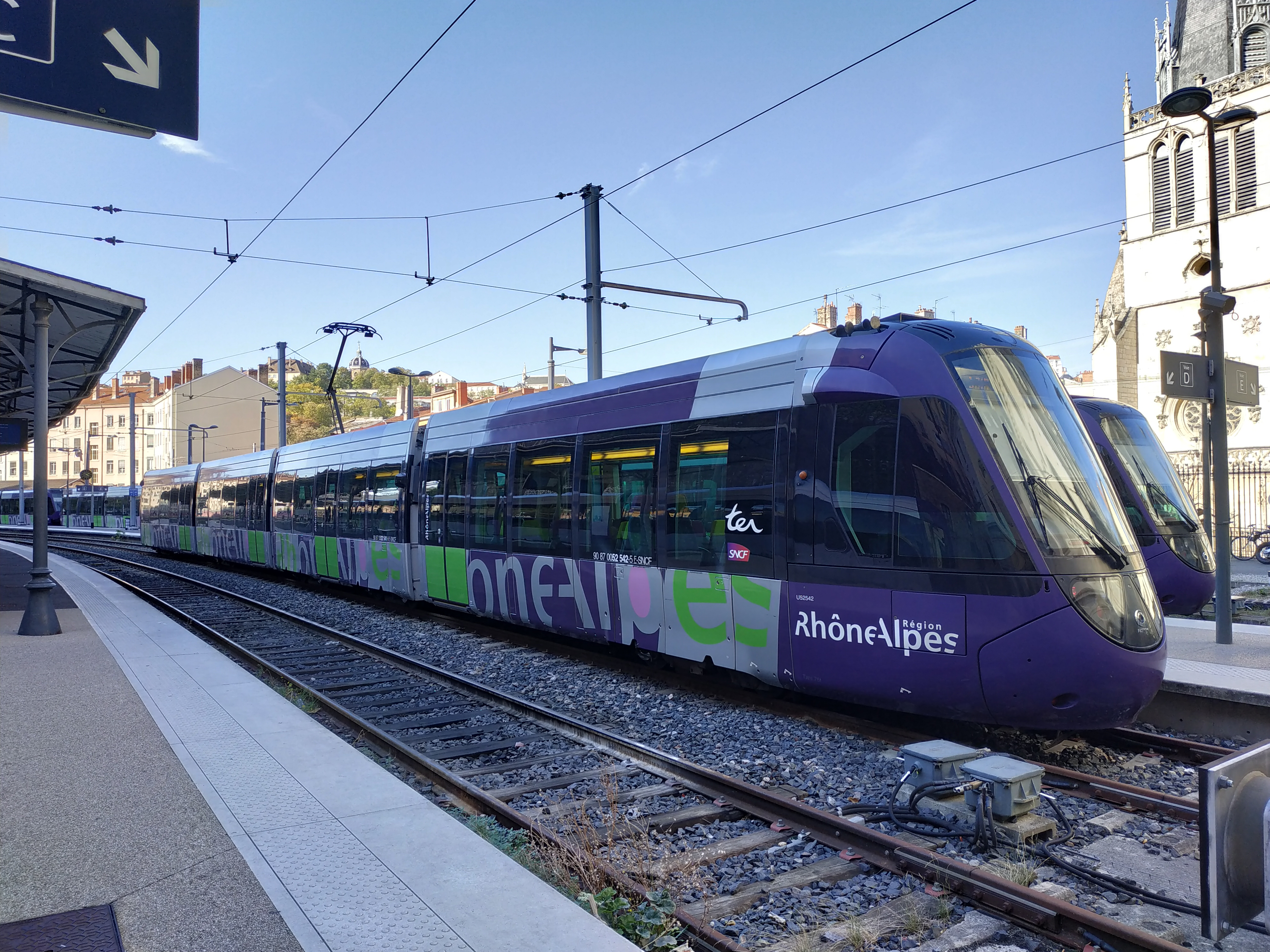 Citadis Dualis en gare de Lyon-Saint-Paul